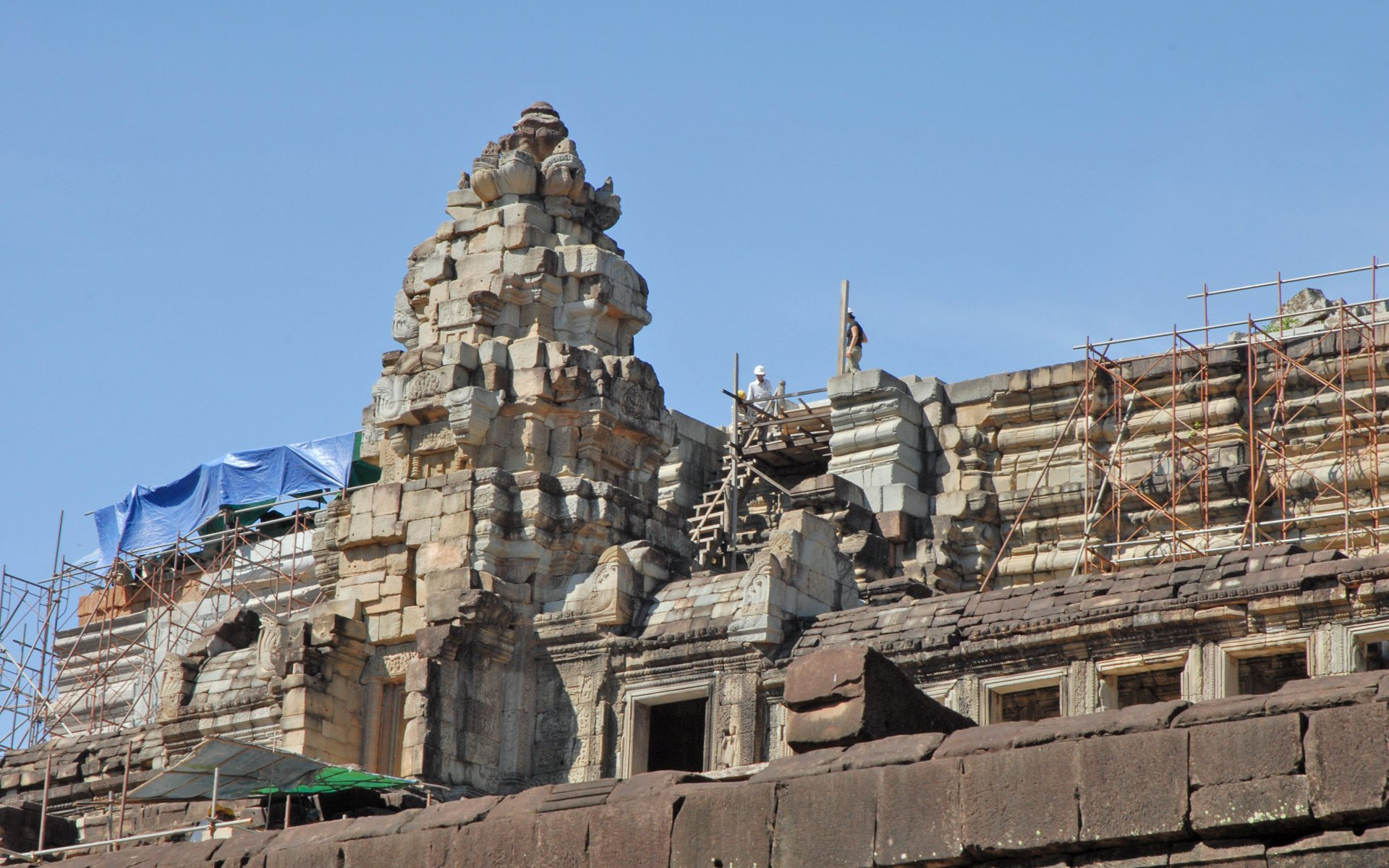 La Baphuon est en cours de restauration par l'EFEO (Angkor Thom)